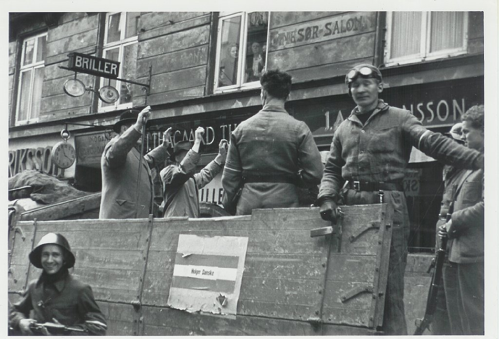 Frihedskæmpere fra Holger Danske afhenter mistænkte til internering. Sted: Store Kongensgade, København Dato: Maj 1945 Se flere billeder her: Rights: More about The Museum of Danish Resistance (Frihedsmuseet)